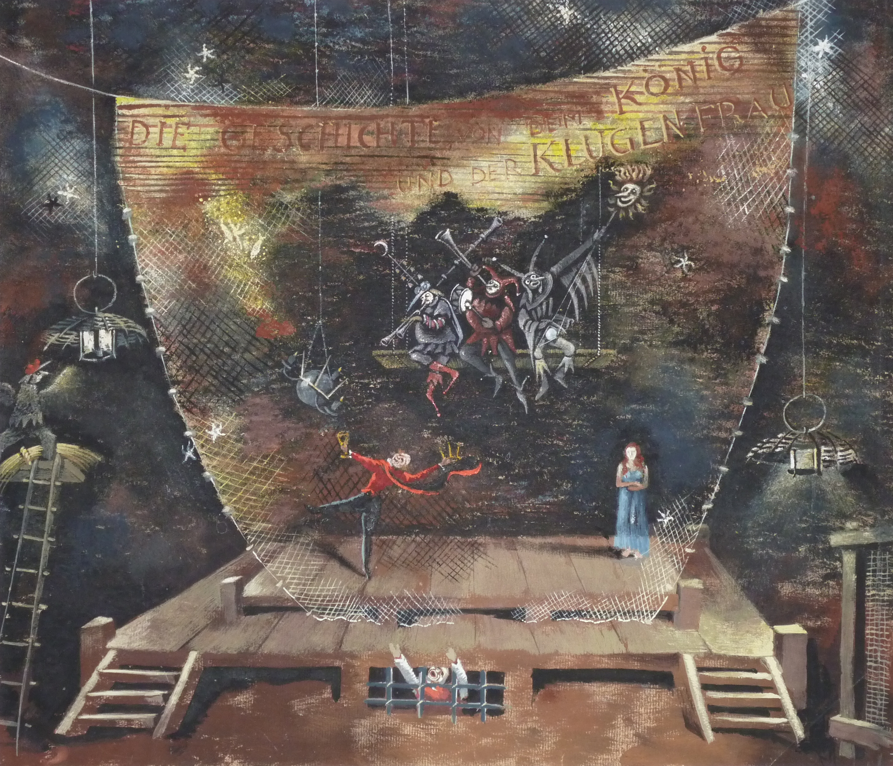 Bühnenbildentwurf von Helmut Jürgens für "Die Kluge" von C. Orff, Aufführung München 1948